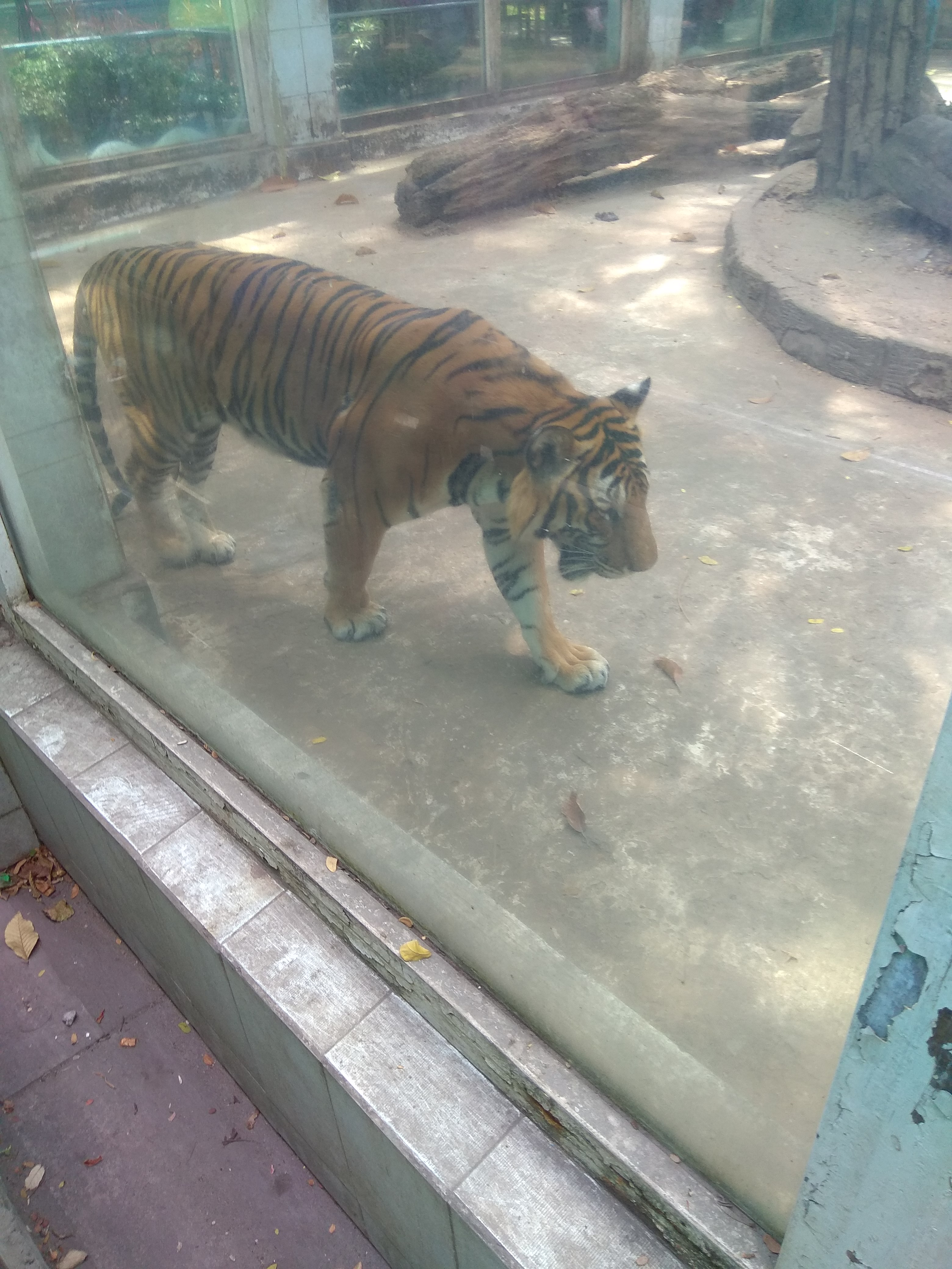 西貢動物園的印度支那虎。越南的野生老虎數量非常稀少，老虎在越南動物園圈養數量卻有150頭以上。